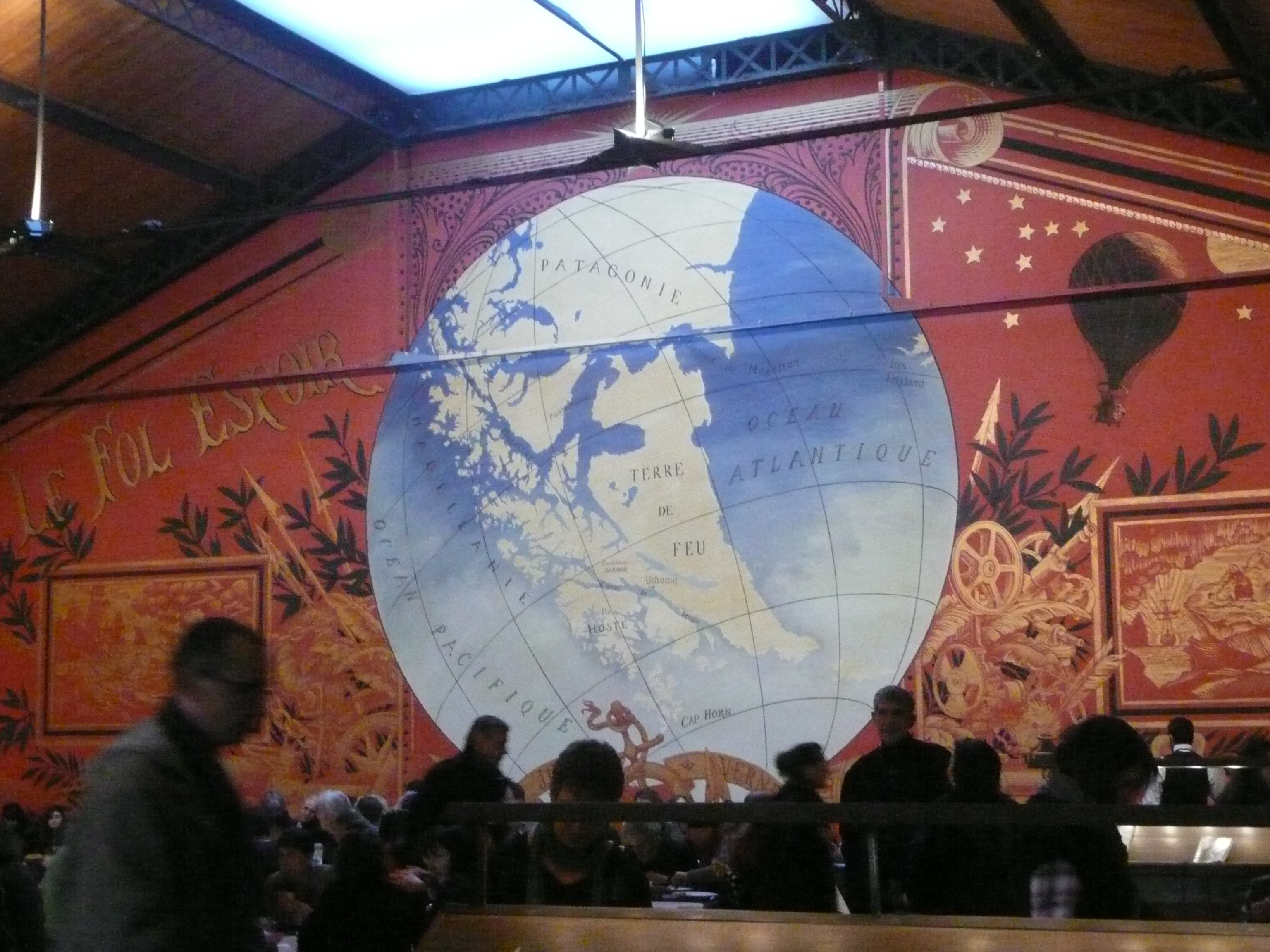 Accueil du Théâtre du Soleil d'Ariane Mnouchkine (Paris, France) le 4 avril 2010. À même les murs ont été peintes d'anciennes réclames à l'occasion du spectacle Les Naufragés du Fol Espoir (Aurores).